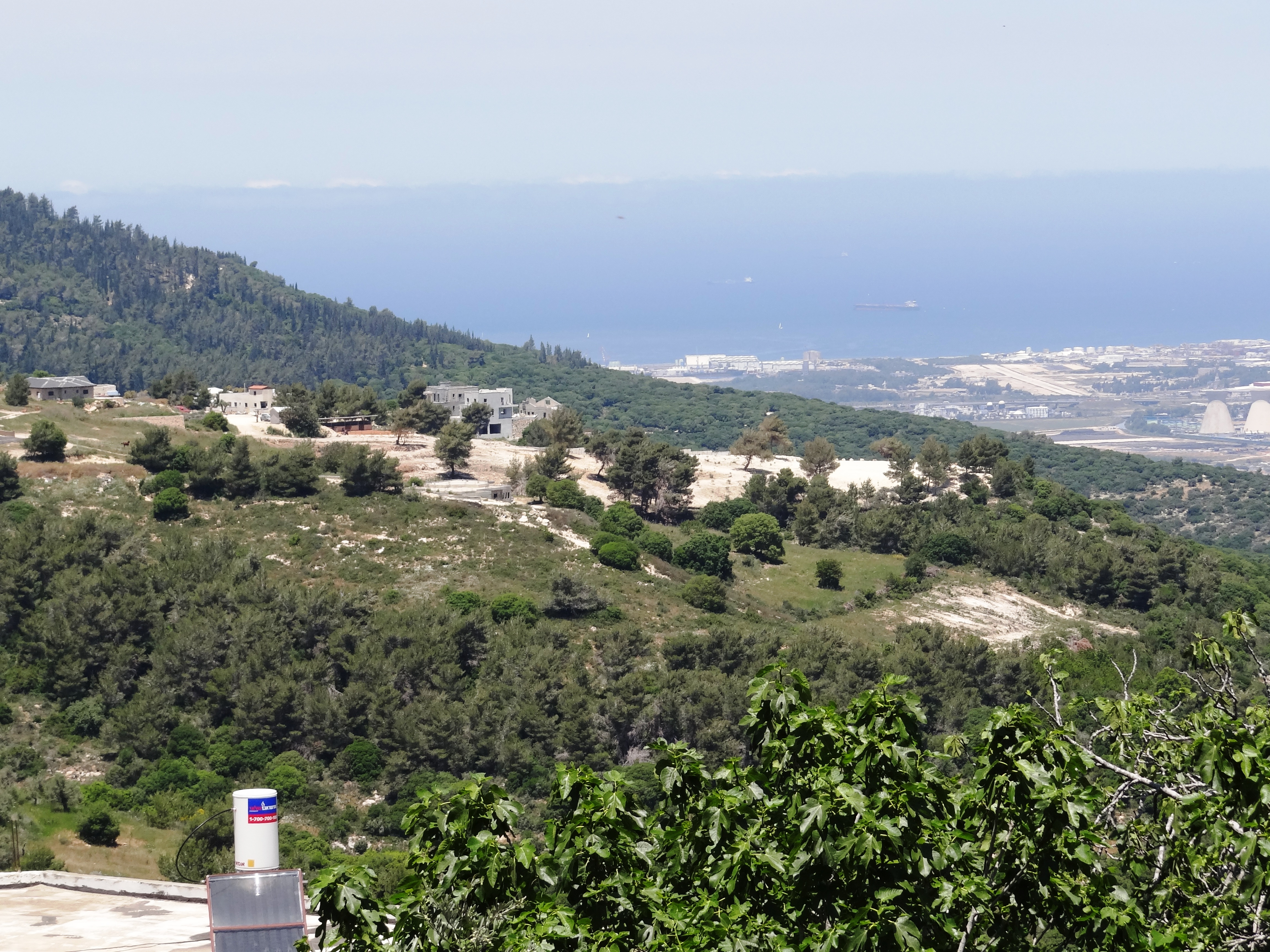 מטמון עספיא התגלה בשנת 1960 בכפר עספיא שבכרמל, מקורו בחוסיפה העתיקה. זהו מטמון הכולל 4,560 מטבעות כסף. המטמון כולל 3,400 מטבעות שקל מצור, 1,000 חצאי שקלים מצור ו-16 דינרים רומיים. באוסף מוזיאון הכט נמצאים 57 שקלים ו-24 חצאי שקלים מצור, ו- 3 דינרים רומיים. השקל הקדום ביותר באוסף הוא משנת 24/25 לפנה"ס והמאוחר ביותר הוא משנת 49/50 לספירה האזור בעספיא בו נמצא המטמון